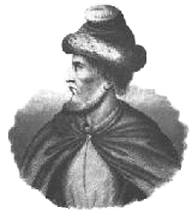 King Samo